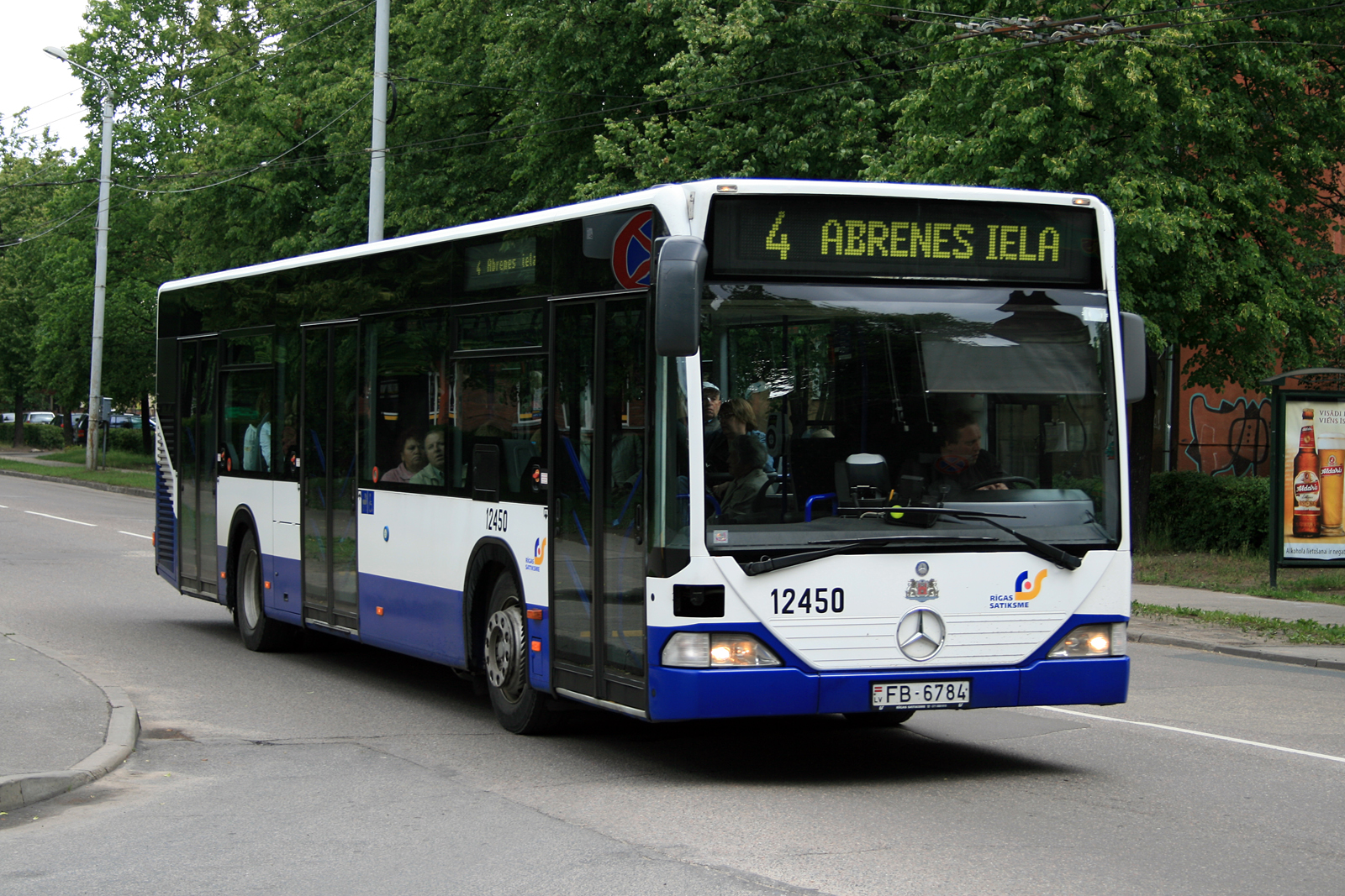 4. autobuss, 15.06.2009.